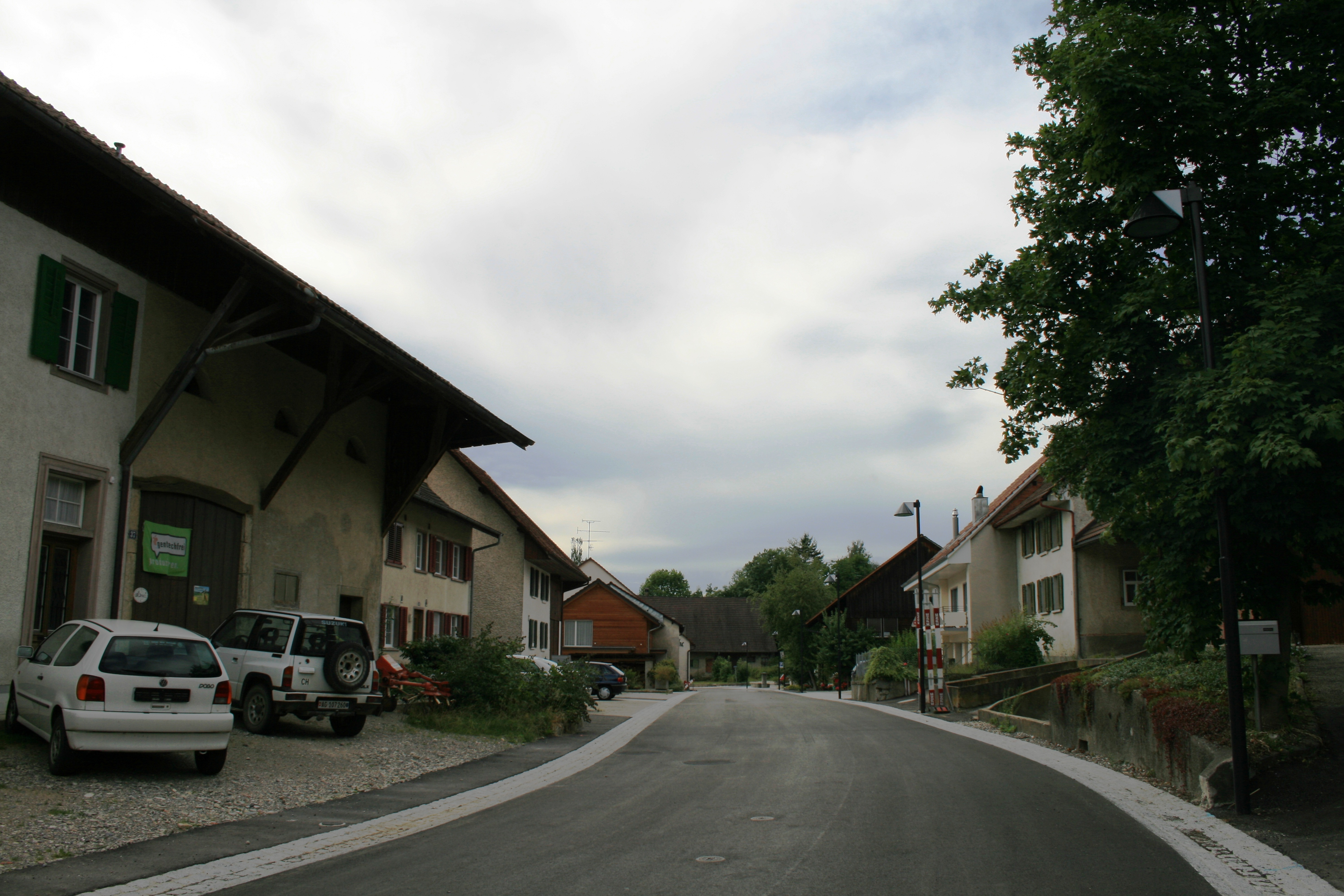 Effingen AG, Switzerland